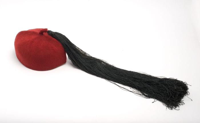 De fez is een hoofddeksel van Ottomaanse oorsprong, dat grote populariteit genoot vanaf de 19e eeuw (nadat sultan Mahmud II in 1826 het hoofddeksel onderdeel liet uitmaken van zijn hervormingen). De fez maakte aanvankelijk deel uit van het uniform van Ottomaanse militairen. De kleur rood werd in het Ottomaanse rijk veelal geassocieerd met het leger. Later werd het de dracht van de stedelijke notabelen. In 1925, twee jaar na de stichting van de Republiek Turkije, werd de fez in dat land verboden als onderdeel van de hervormingen van Atatürk. Vanuit het Ottomaanse rijk verspreide de fez zich over de diverse delen van de islamitische wereld. In Marokko wordt de fez met de Arabische term tarbush (tarbouche) aangeduid. Er zijn verschillende termen in omloop. Behalve met de naam "tarbouche el-fasi" wordt deze mannenmuts in Marokko ook als "tarbouche el-misri" (Egyptische fez) aangeduid. De naam "tarbouche el-fasi" komt vooral door het feit dat deze muts vroeger alleen door de elite uit de stad Fez gedragen werd. Tegenwoordig maakt het hoofddeksel in Marokko onderdeel uit van het stedelijke traditionele kostuum (info M. Saadouni, 2005). Het dragen van een fez wordt vaak gezien als een symbool van patriottisme. Om die reden wordt het hoofddeksel ook wel "tarbouche el-watani" (nationale fez) genoemd.